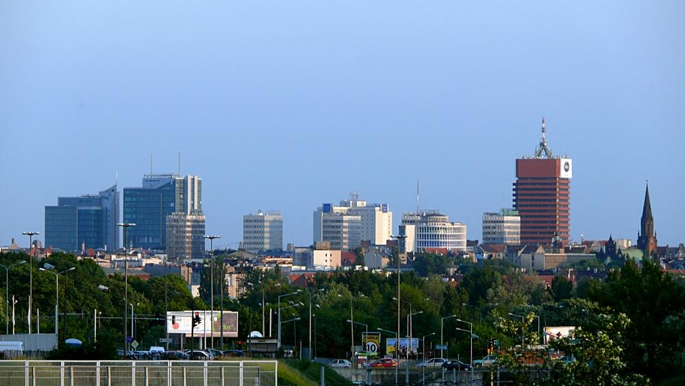 Poznański skyline.